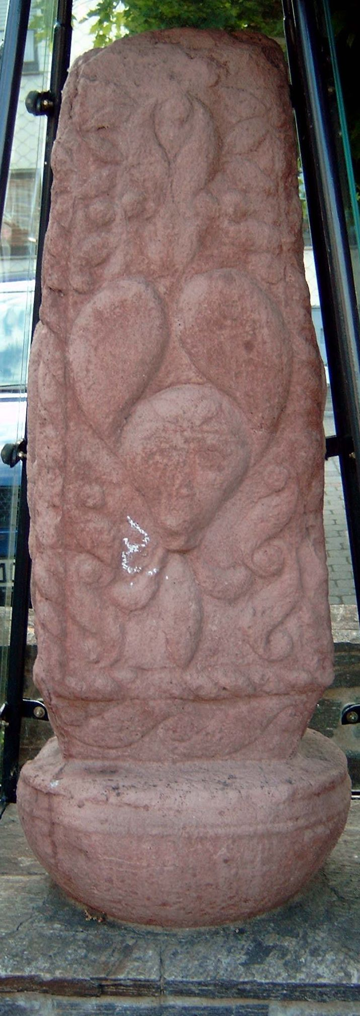 Nachbildung der Flammensäule in Pfalzfeld